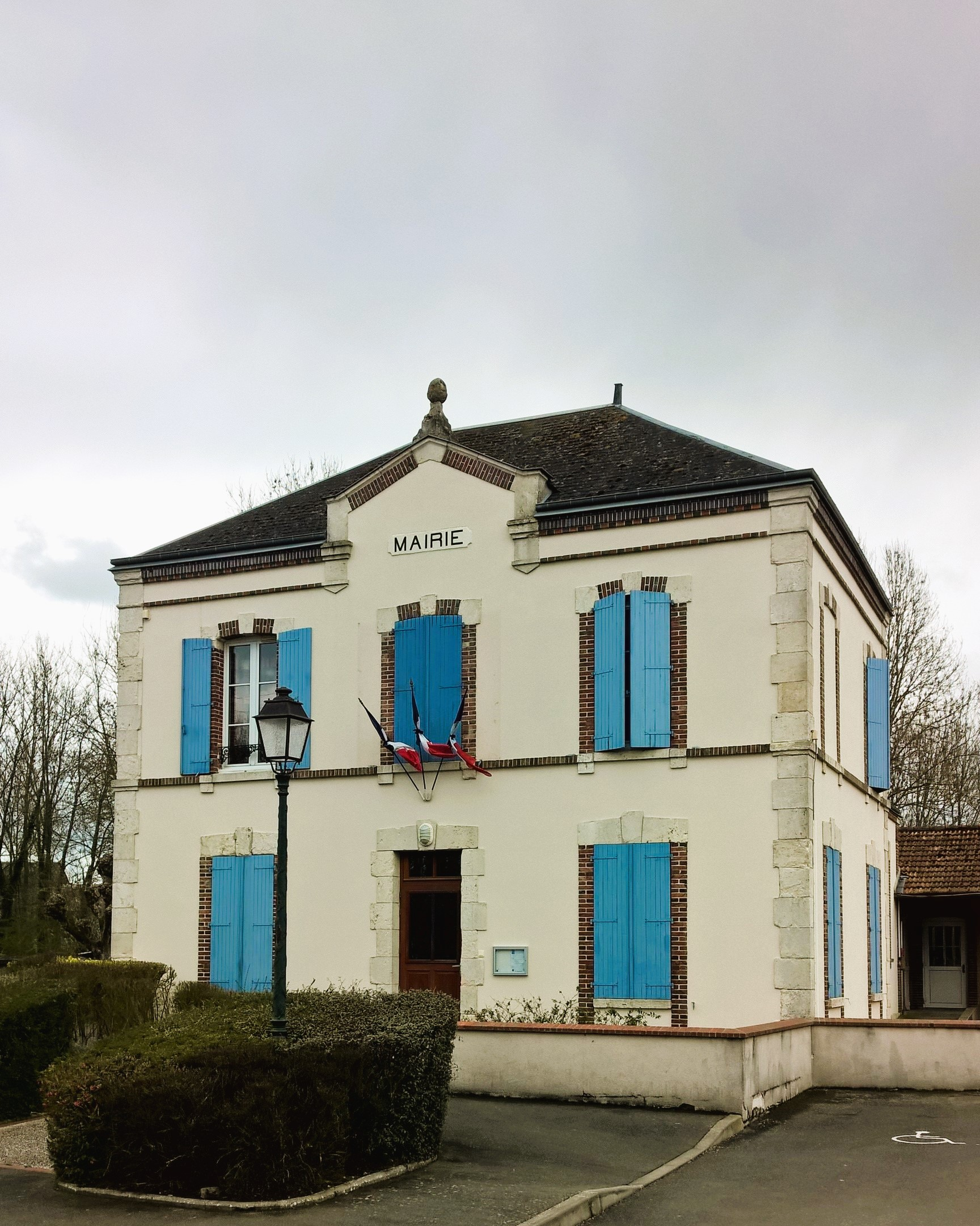 Maire de Corancez (Eure-et-Loir)